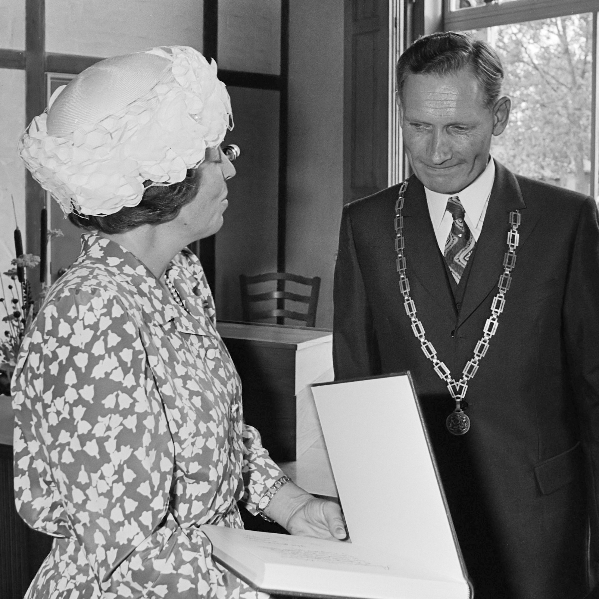 Bezoek koningin Beatrix aan gemeente Wieringermeer t.g.v. 50 jaar droogvallen Wieringermeerpolder. Ter gelegenheid van het 50-jarig bestaan van de polder is een jubileumboek uitgekomen, geschreven door P. Terpstra. Burgemeester Knorr biedt de vorstin het eerste exemplaar aan 21 augustus 1980